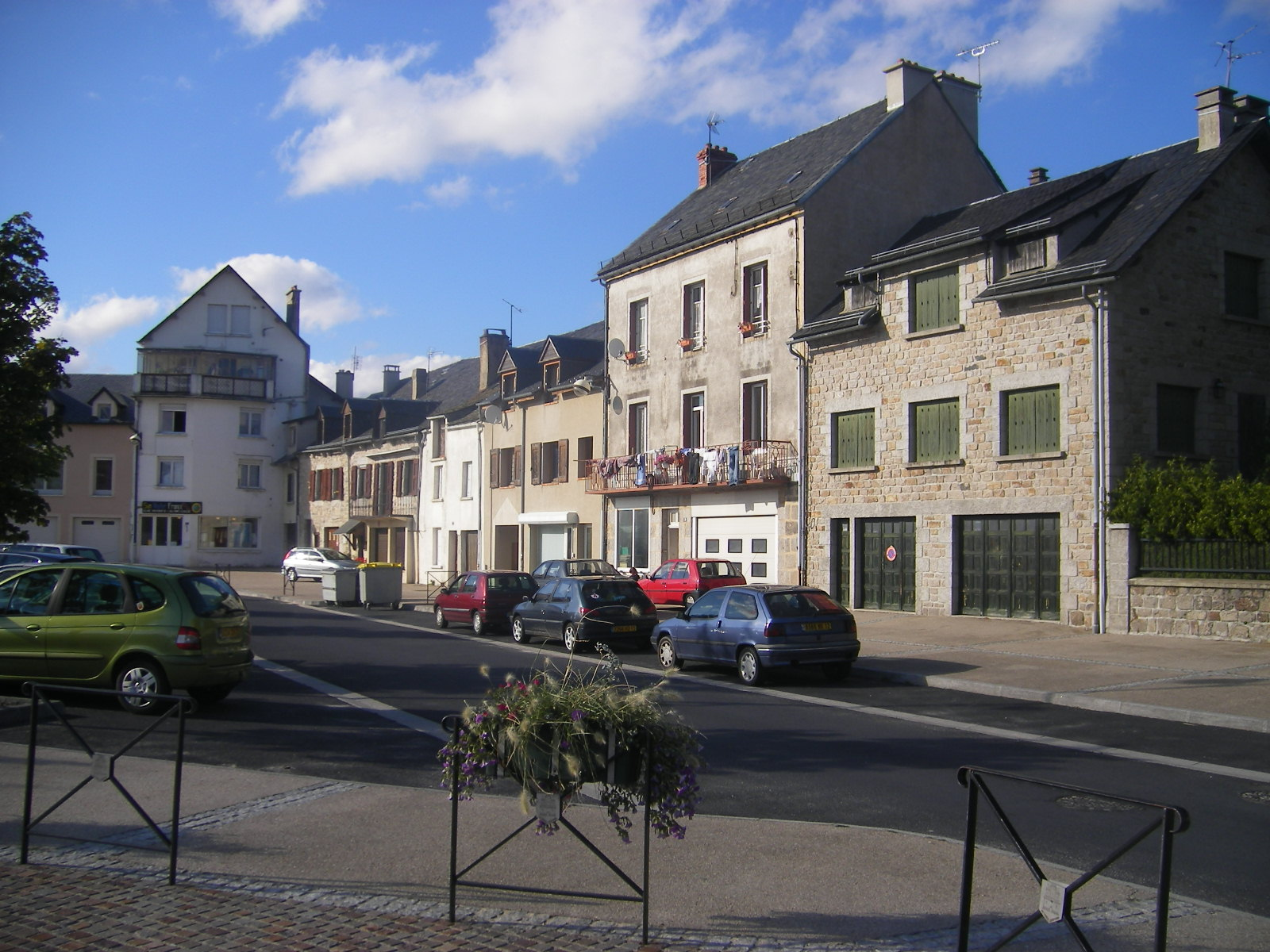 Saint-Chély-d'Apcher